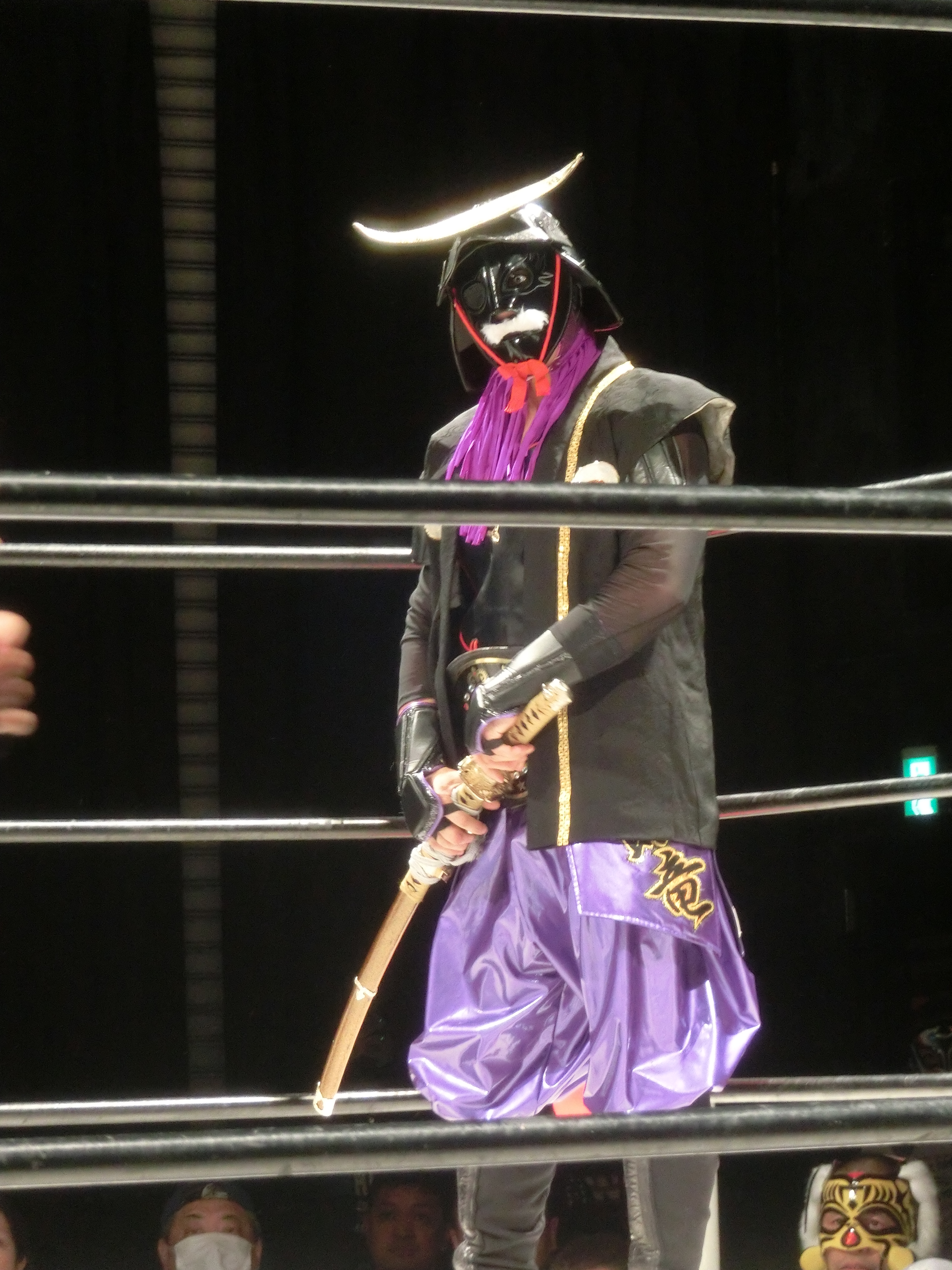 覆面マニア2019年6月9日